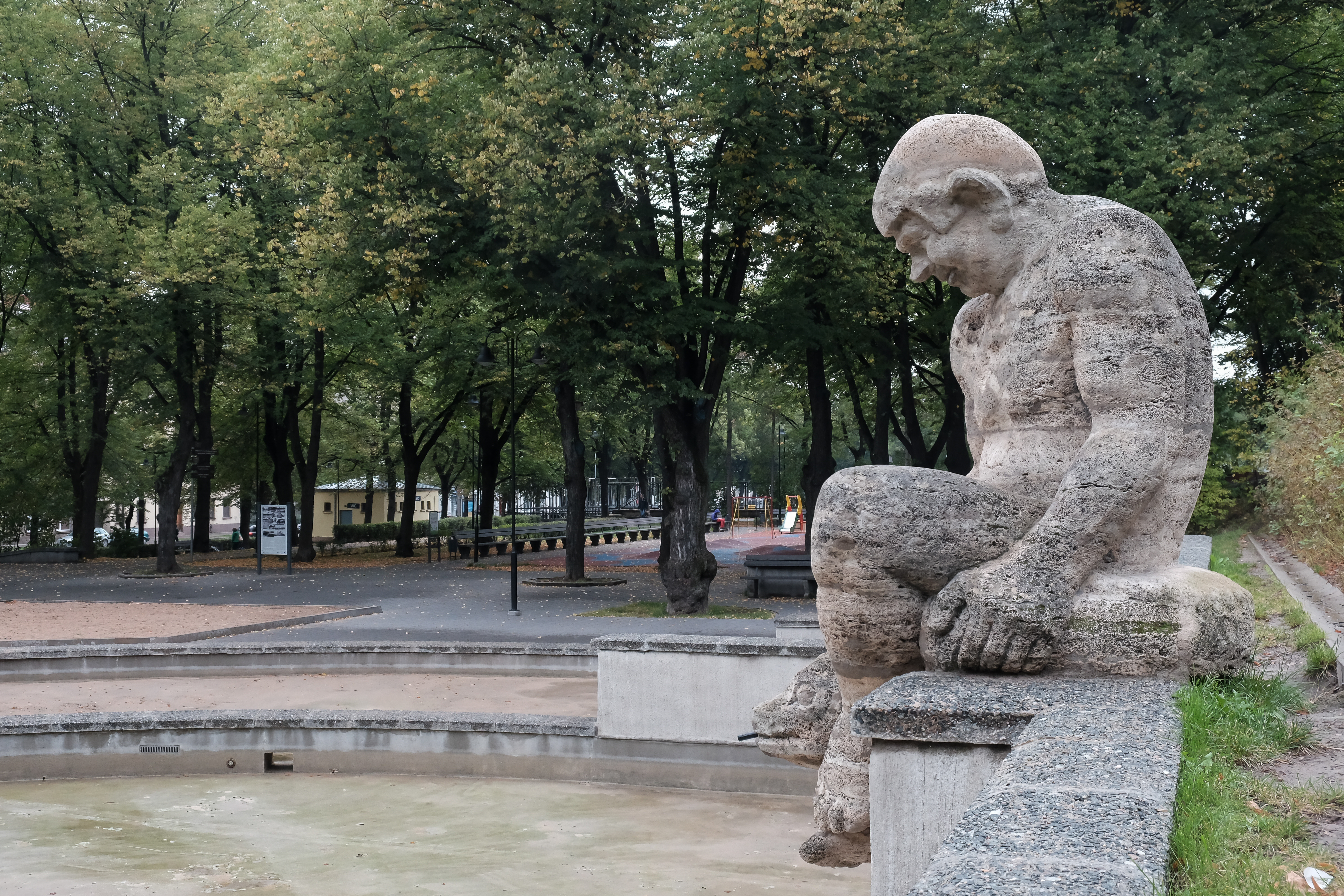 Grīziņkalna parks, Rīga, Pērnavas iela, Lutausis